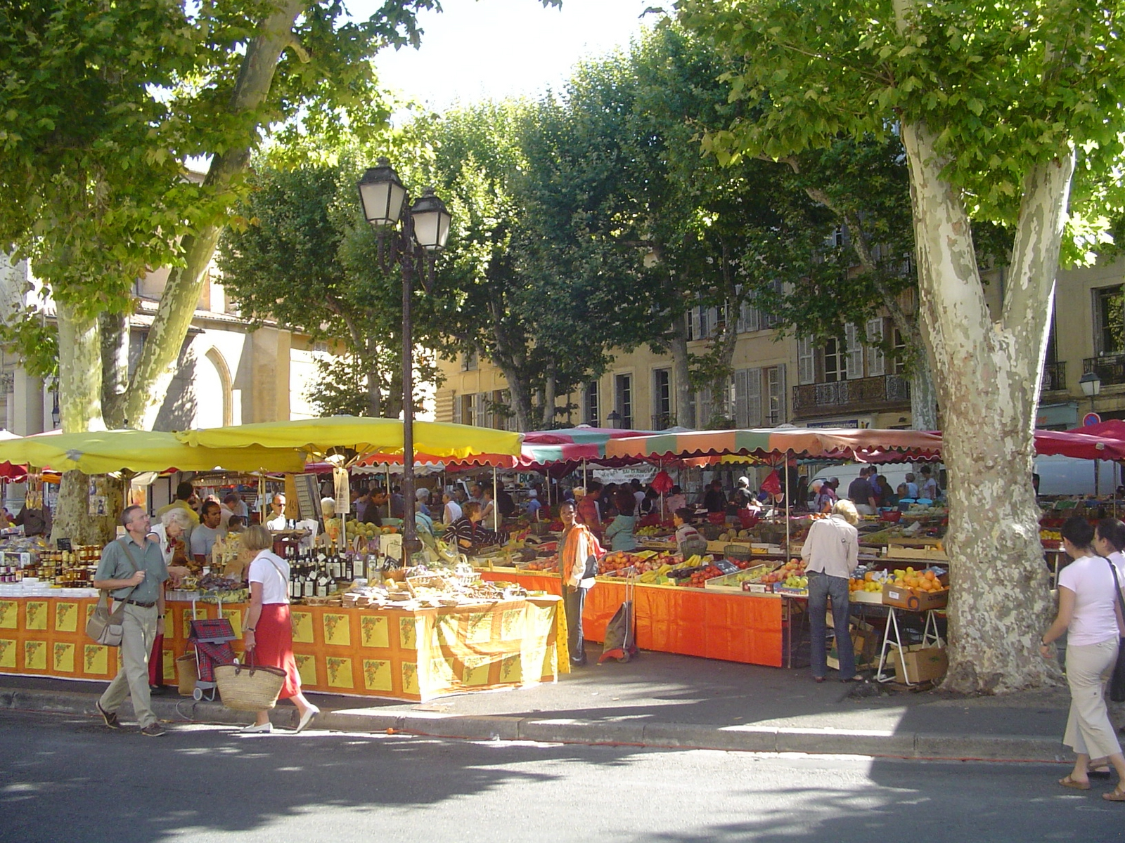 Marché Place des Prêcheurs